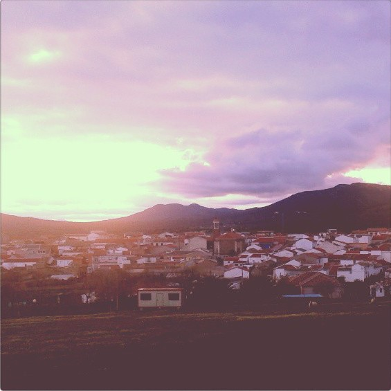 Cabezarrubias del Puerto, Ciudad Real, España.